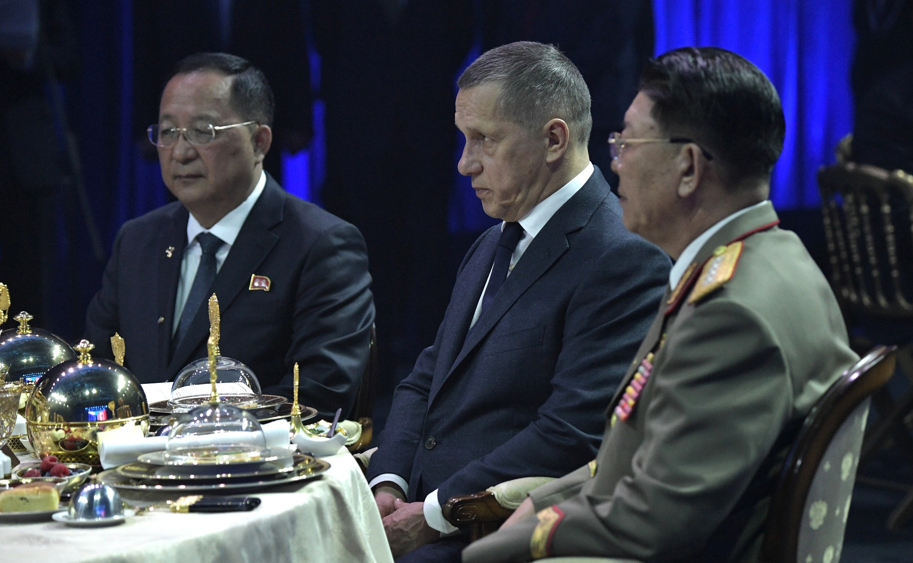 На официальном приёме от имени Президента Российской Федерации в честь Председателя Государственного совета КНДР Ким Чен Ына.